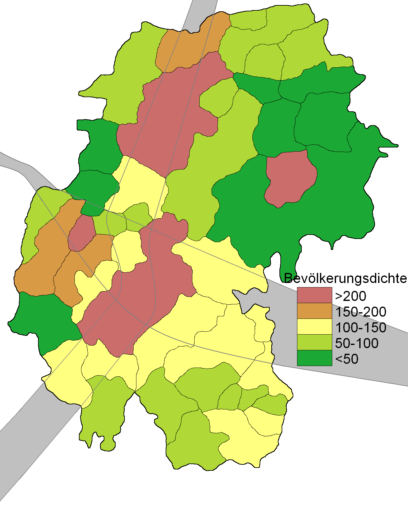 Bevölkerungsdichte der Gemeinden im Ilm-Kreis, Stand 31. Dezember 2005, in Grau sind die beiden Bevölkerungsgürtel eingezeichnet